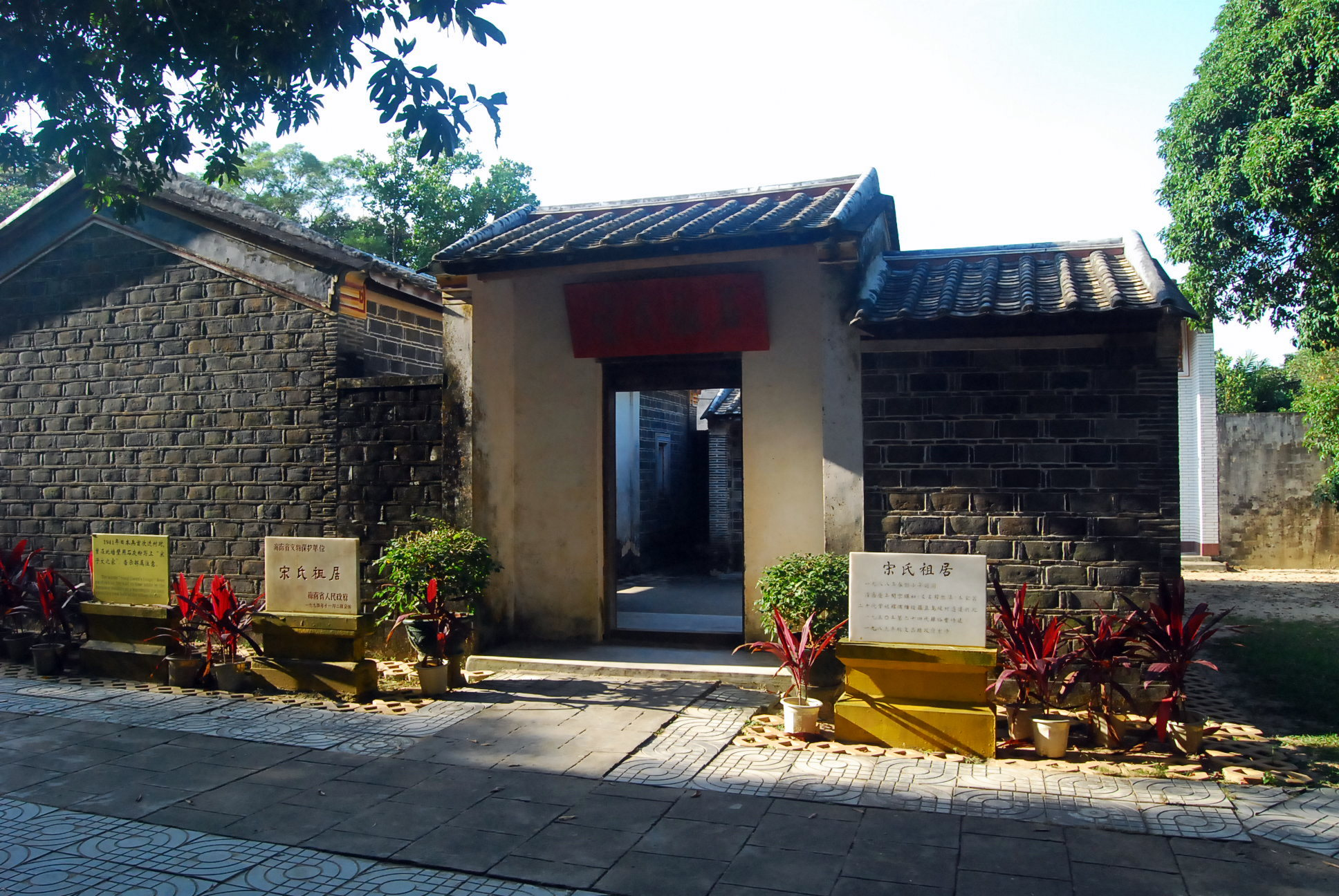 海南文昌宋氏祖居正门